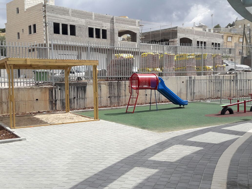 חצר גן ילדים במגזר הערבי בנצרת